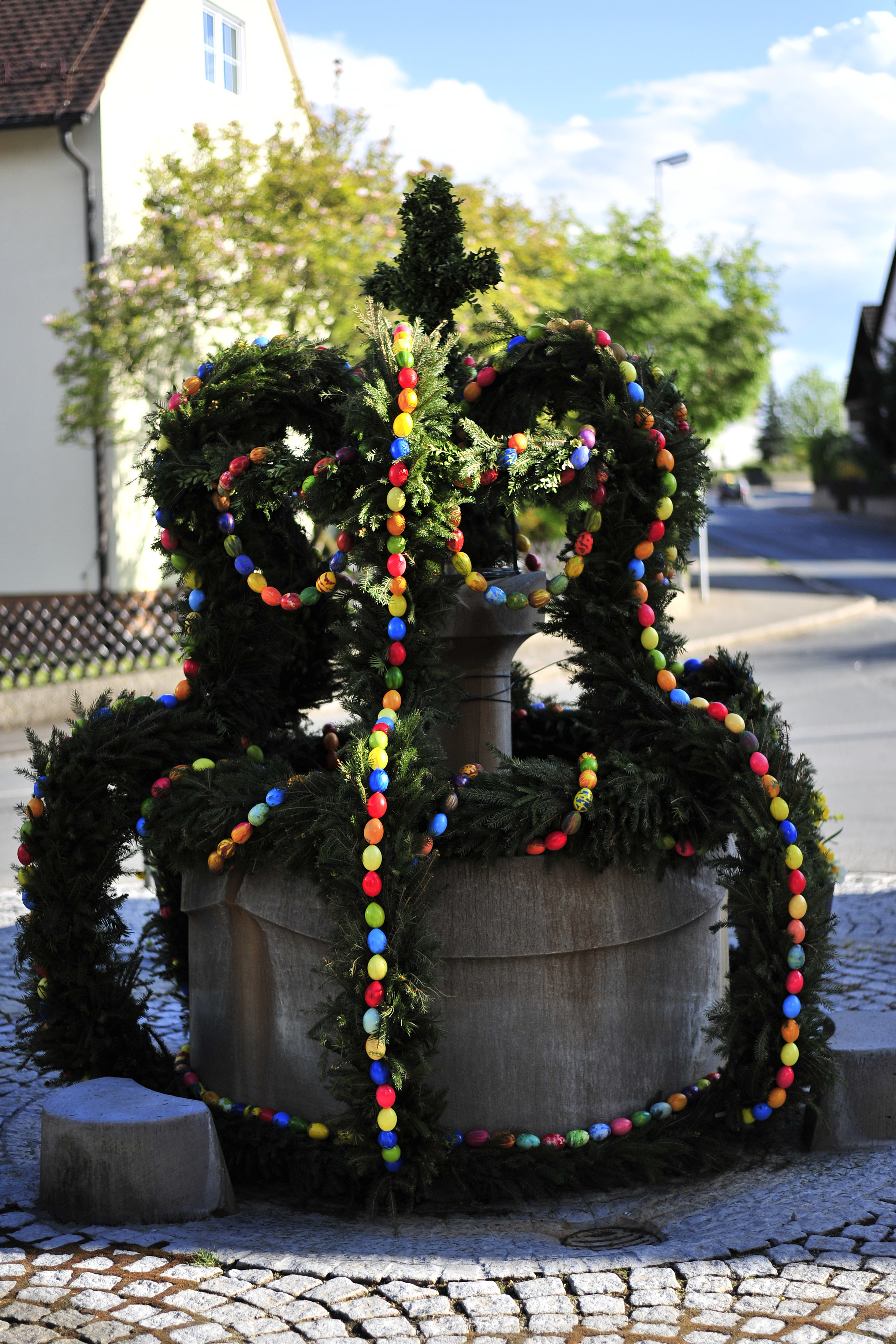 Osterbrunnen in Dormitz